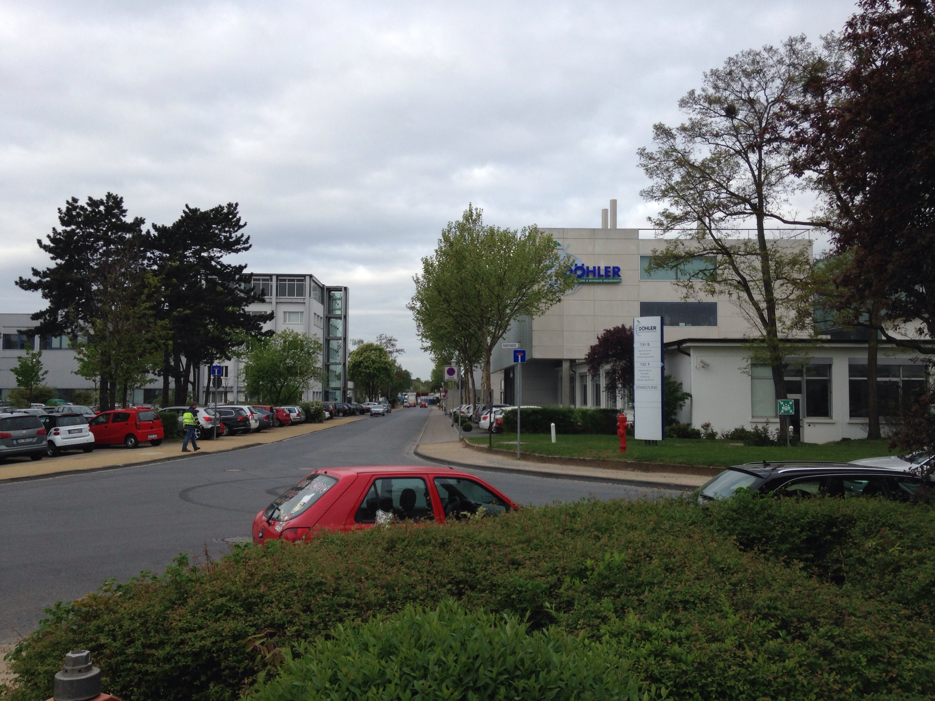 Döhler